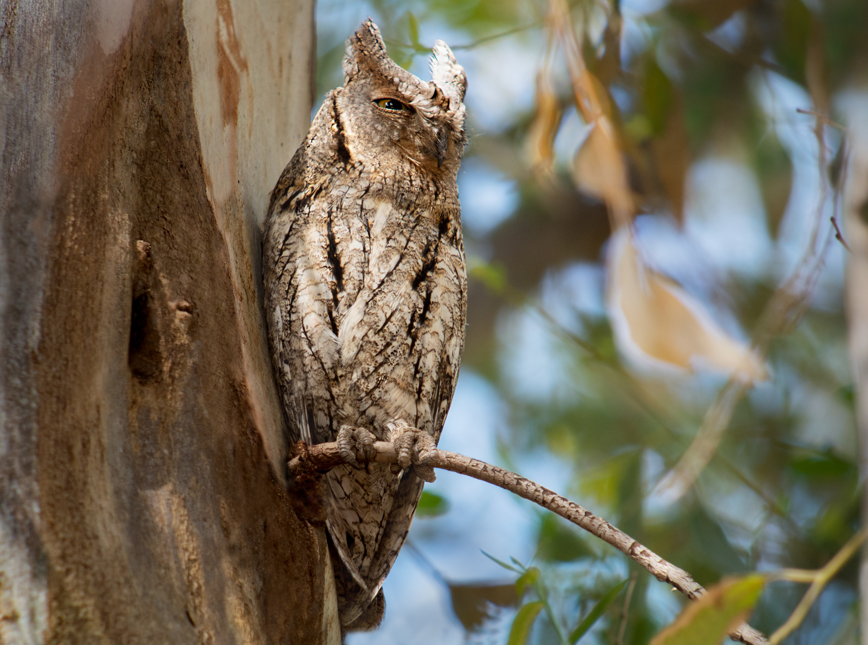 Digiscoping with Swarovski ATM 80 HD 30 X, Nikon 1V1 + 11-27,5 mm lens (Adapter DCB)